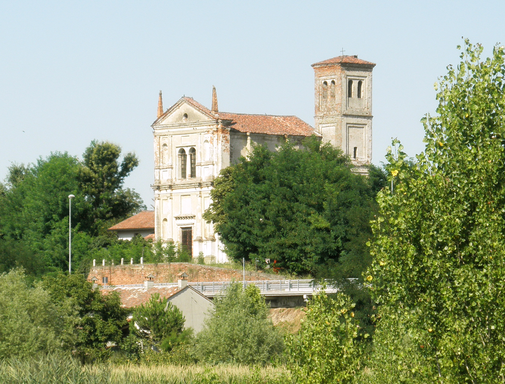 L'oratorio di Maria SS. Annunziata (detto in Galilea) a Senna Lodigiana.